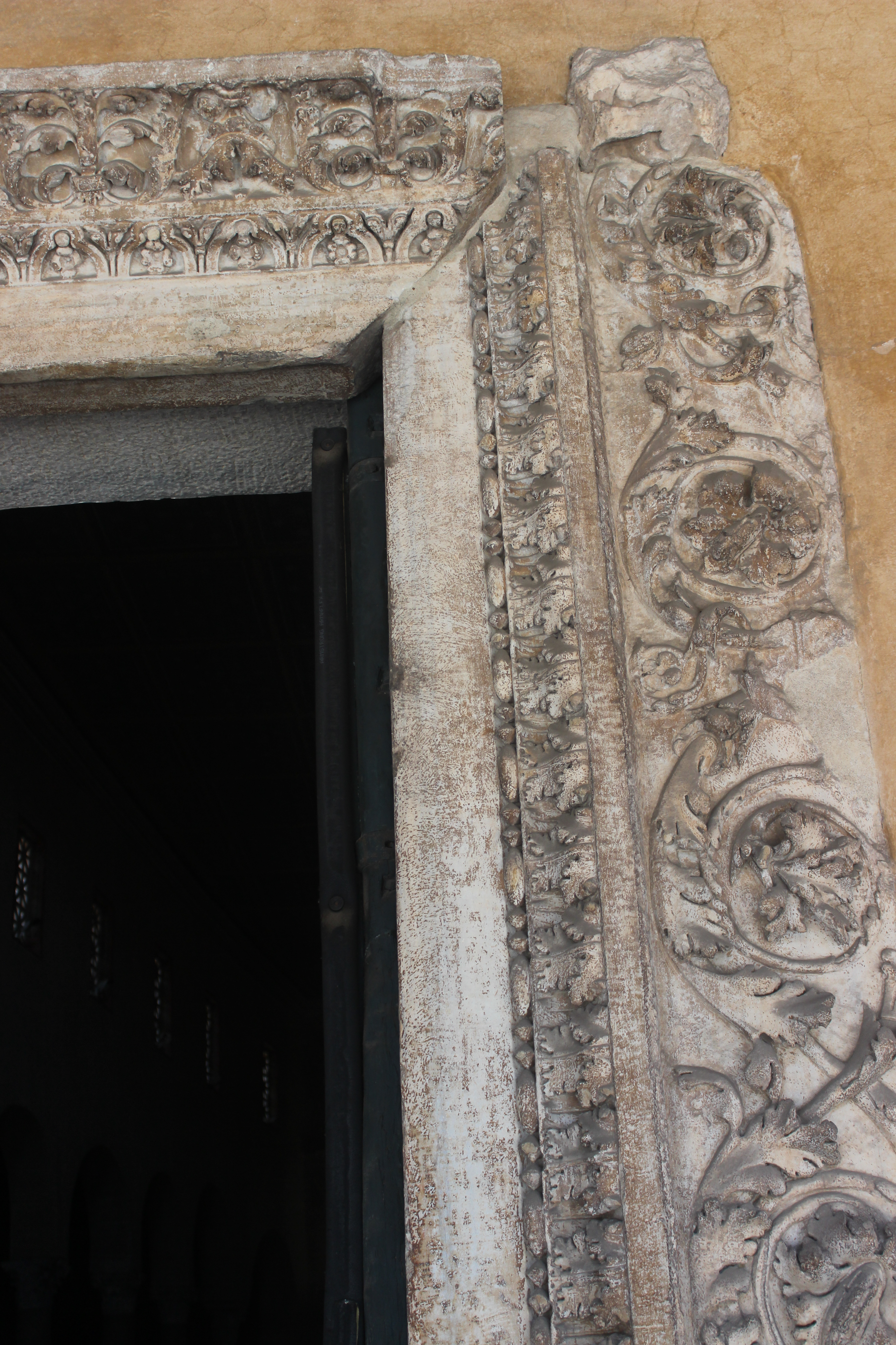 Roma. San Giorgio in Velabro. Exterior, detalle de la puerta de ingreso.